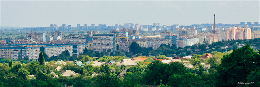 Вид з Діївки на багатоповерхову забудову Вітрила, Покровського й Червоного Каменя. На середньому плані, за річкою Дніпро, у Амур-Нижньодніпровському районі Дніпра, по центру - багатоповерхова забудова Ломівського, справа - селище Кам'янка, зліва - Ломівки. На задньому плані - багатоповерхівки на проспекті Миру у Лівобережному Індустріального району.